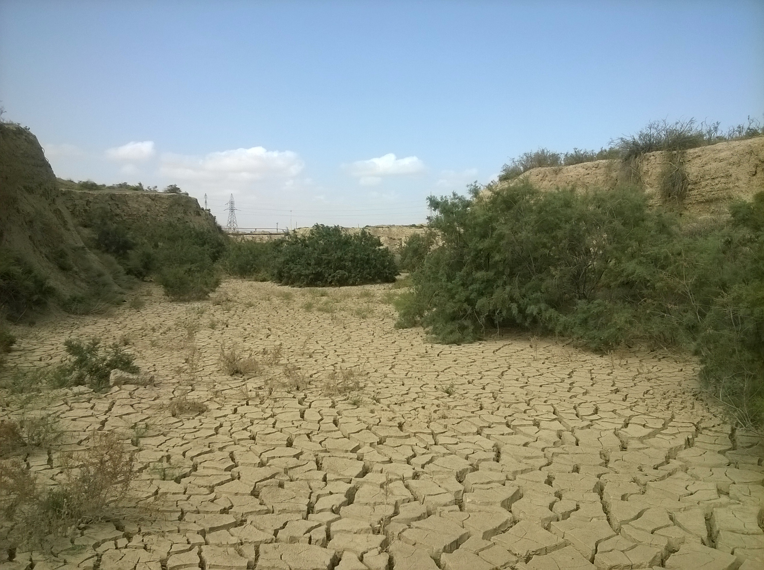 Takır